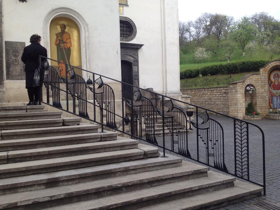 Металеві перила авторства О.Боньковського (1998) у церкві Св.Онуфрія у Львові